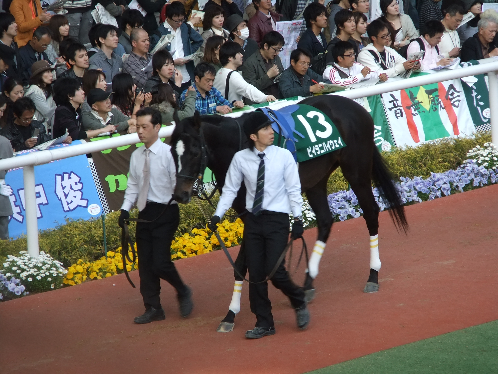 ピイラニハイウェイ 2011年4月10日 阪神競馬場